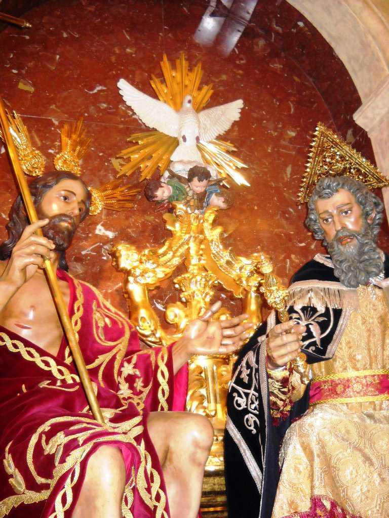 Esta es la Santísima Trinidad, titular de la hermandad homónima de Sevilla